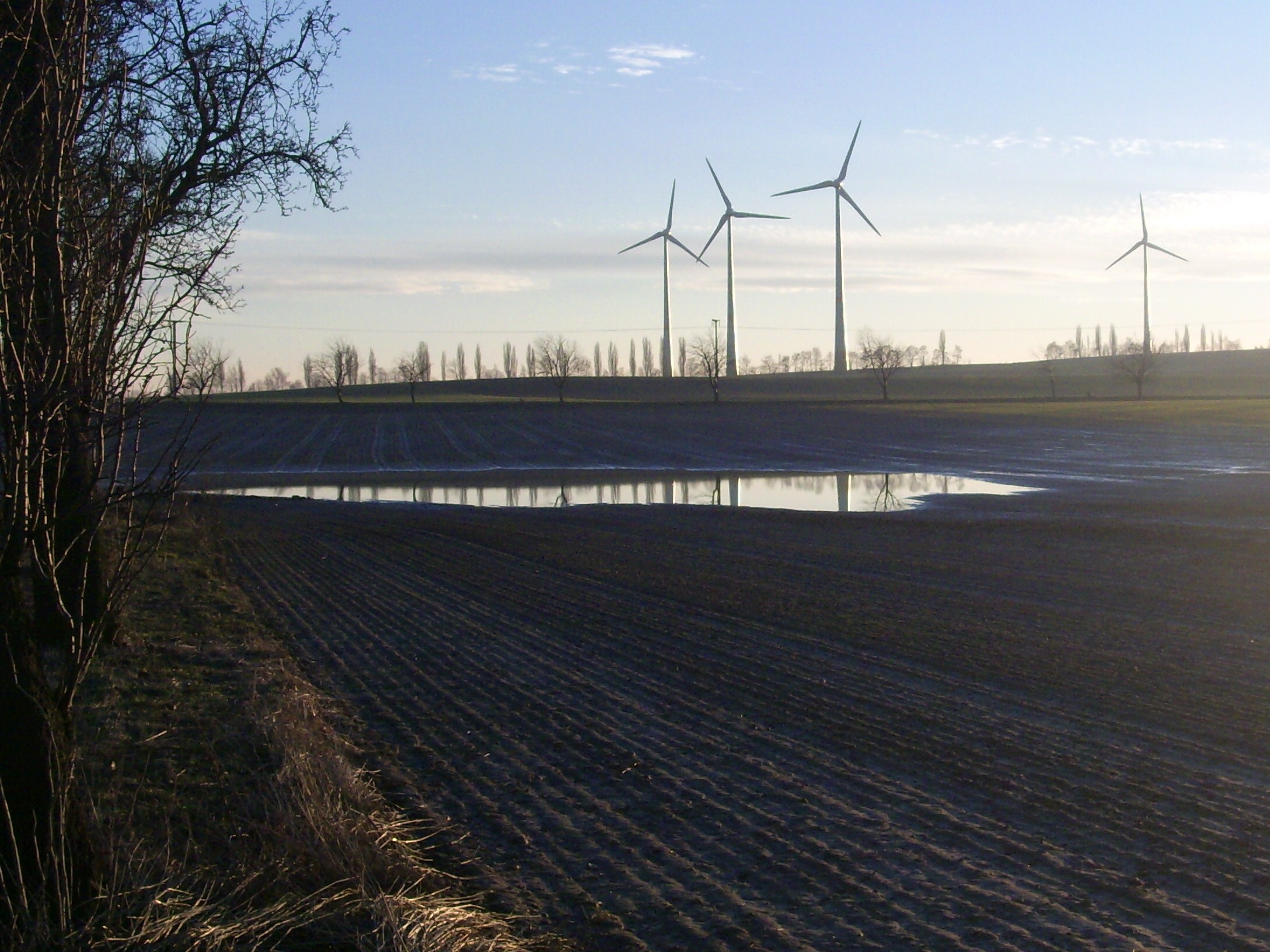 Wasseransammlung unmittelbar gegenüber der früheren Lage des Paltzschener Sees